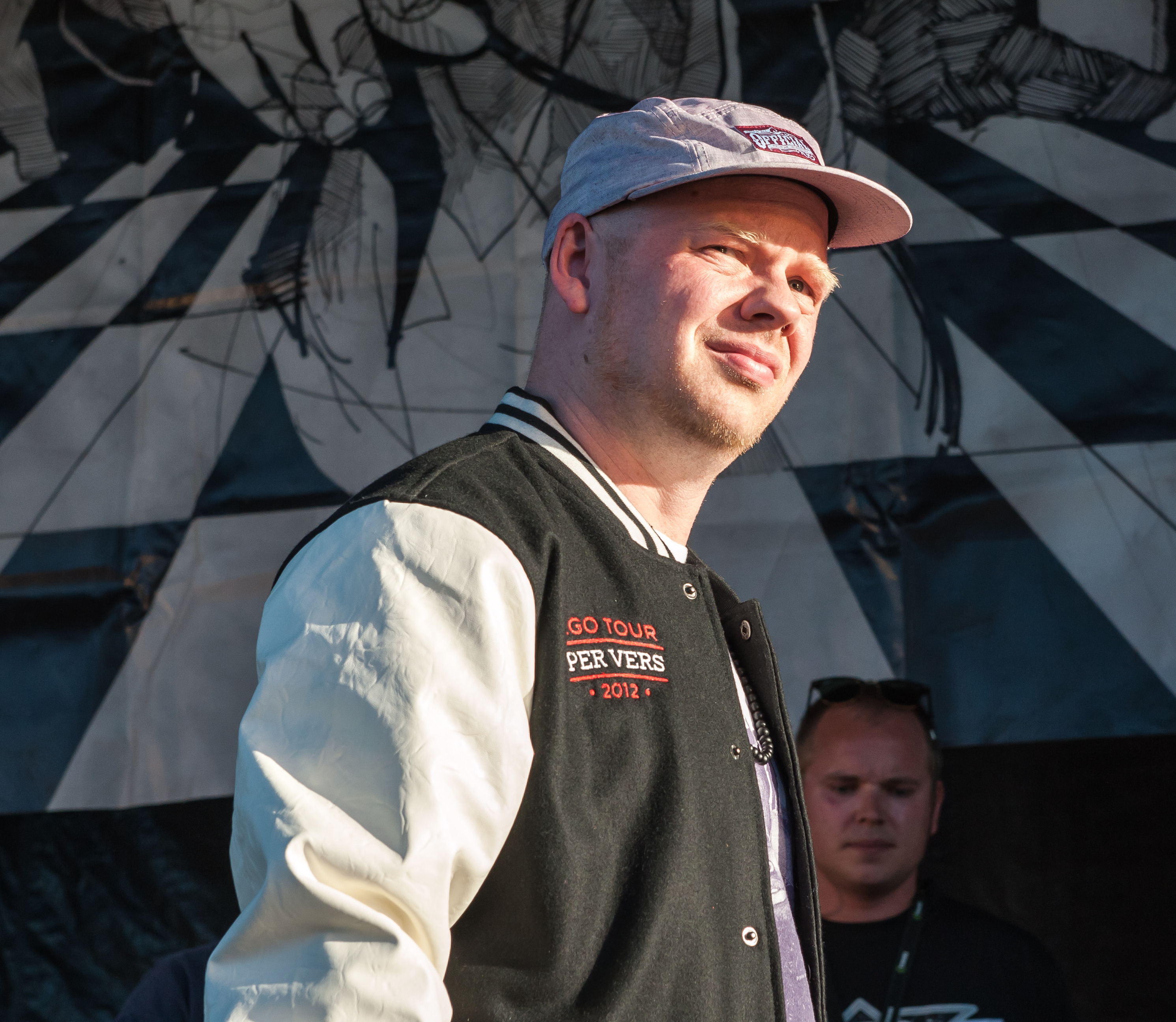 Per Vers som konferencier på Street Party 2012. Frederiksberg, København